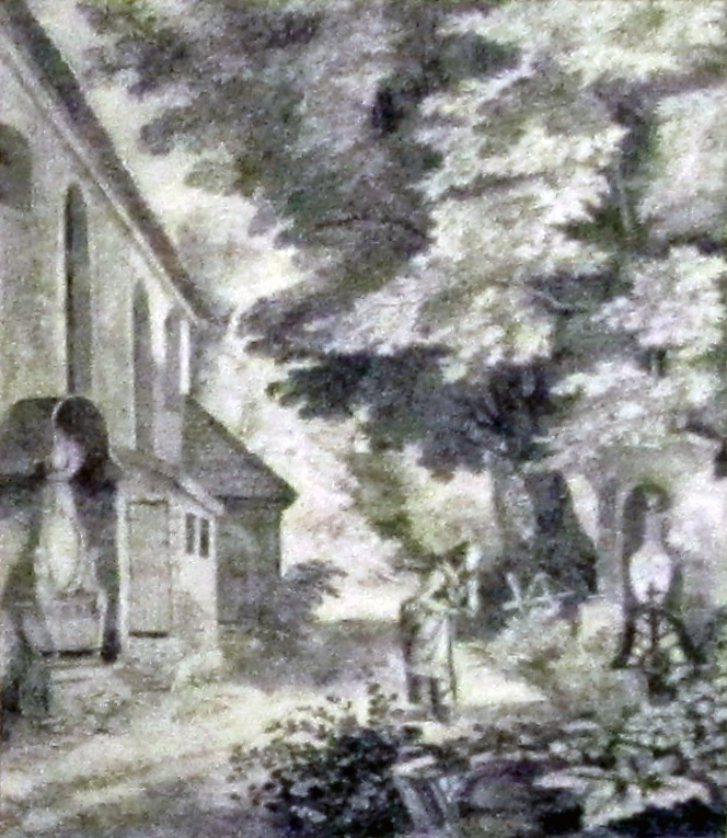 Kaditzer Linde